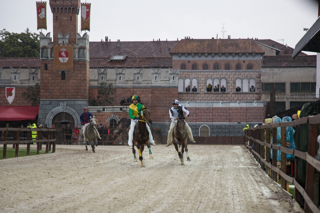 Corsa ippica del Palio di Legnano 2016